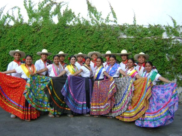 La delegación de jarabe mixteco que se presento en la guelaguetza 2009